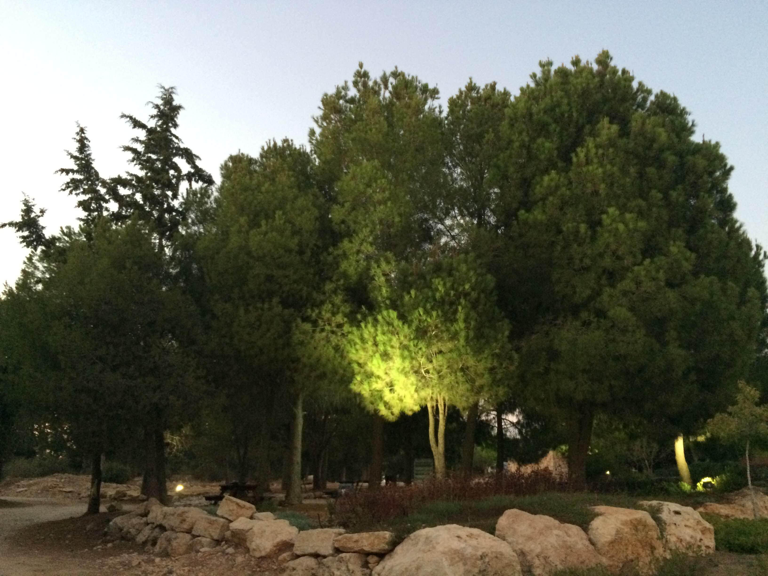 חזית היישוב